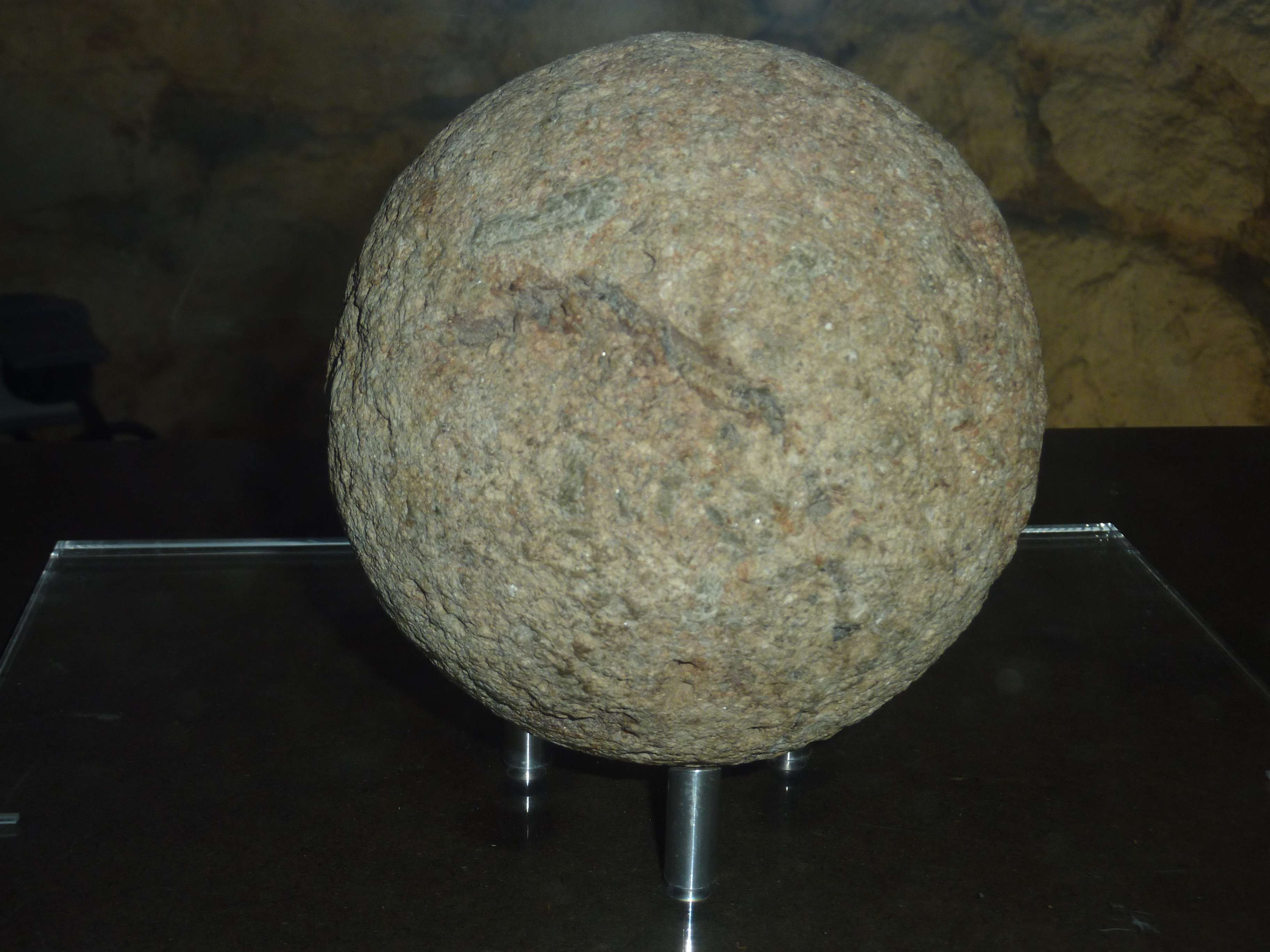 Le mel beniguet de la chapelle Saint-Meldéoc de Locmeltro lLe mel beniguet (en breton, "marteau béni" en français), dont l'origine remonterait à la préhistoire, est une pierre sphérique qui servait à abréger les souffrances des malades incurables en les assommant. Petit à petit, il a été christianisé et on le présentait au mourant en le disposant sous l'oreiller. Le malade était ainsi invité à partir pour l'autre monde. Cette coutume s'est perpétuée jusqu'au début du XXe siècle.